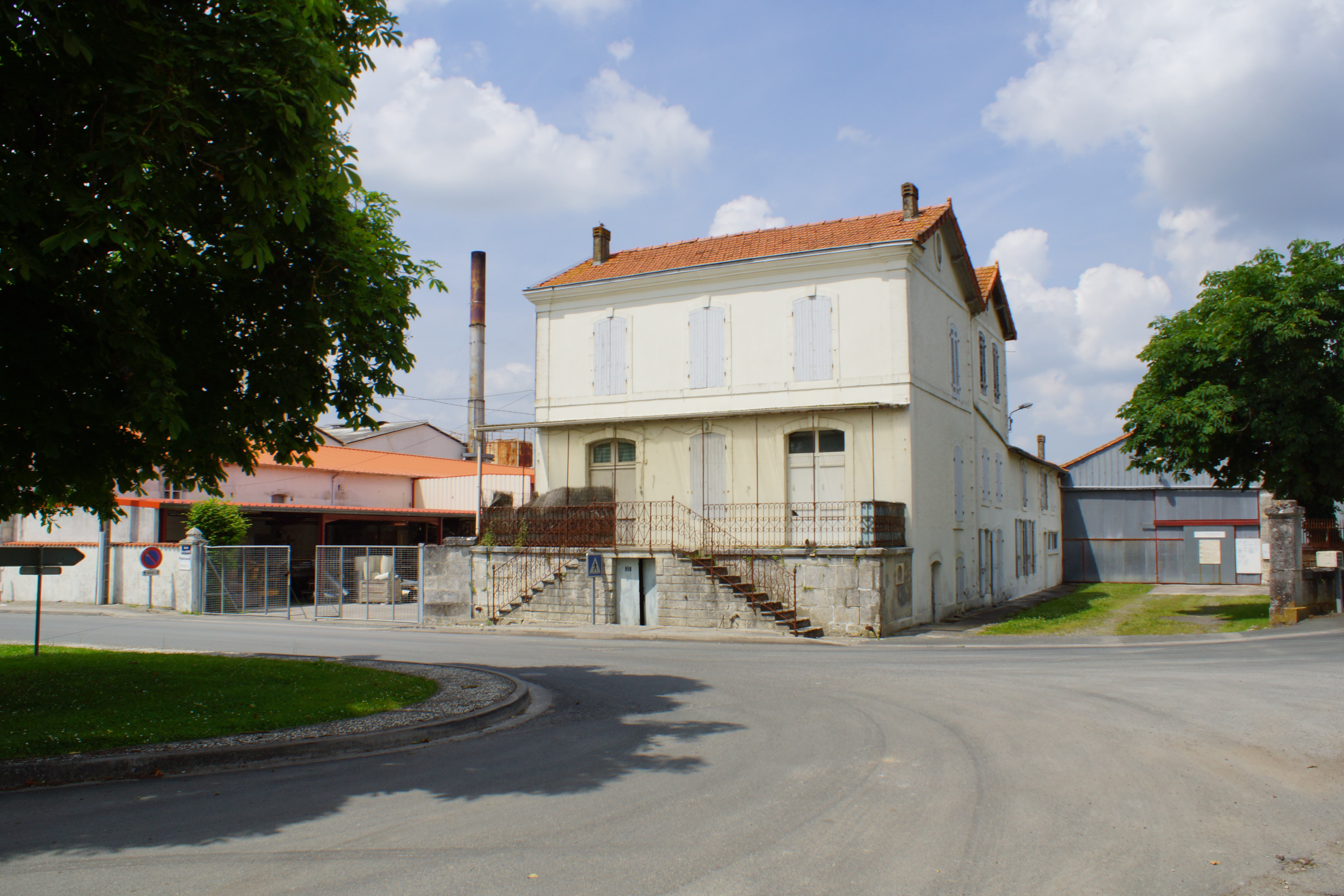 Gare de Loulay : bâtiments de la scierie et usine de contreplaqué Malvaux établie au 21 de la rue de la gare en face de l'entrée de la gare ferroviaire.